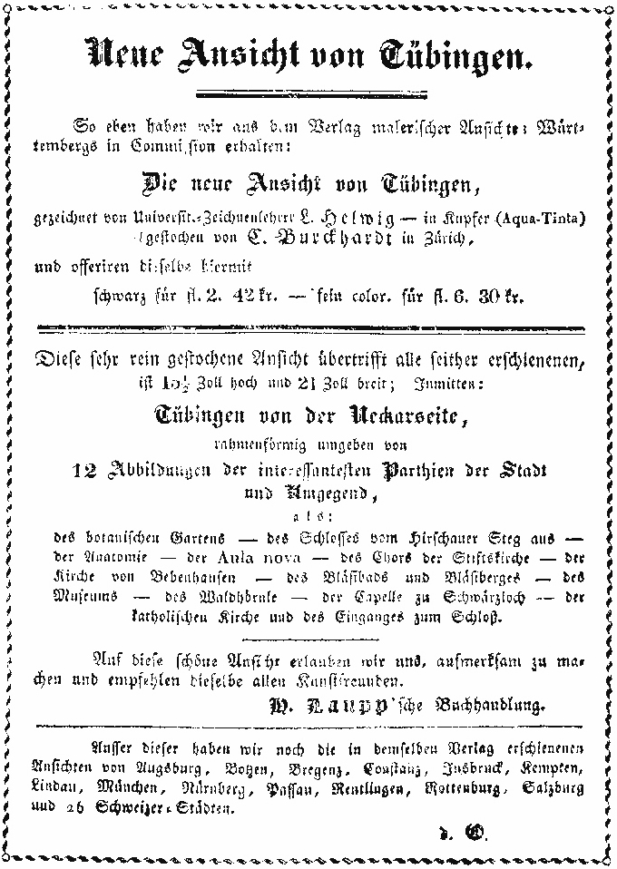 Annonce zu Ludwig August Helwigs Sammelbild von Tübingen, erschienen im "Tübinger und Rottenburger Intelligenzblatt"